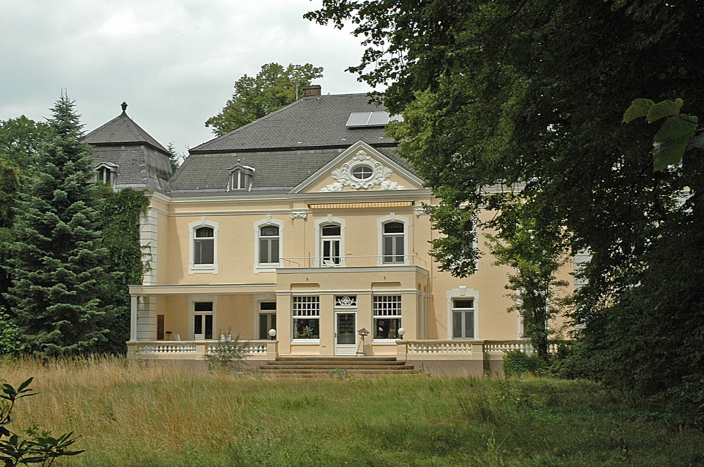 Schloss Sonsfeld von der B 8 Seite aus fotografiert (Friedel Peters)